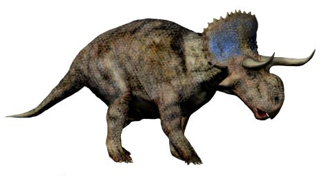 Nasutoceratops titusi.